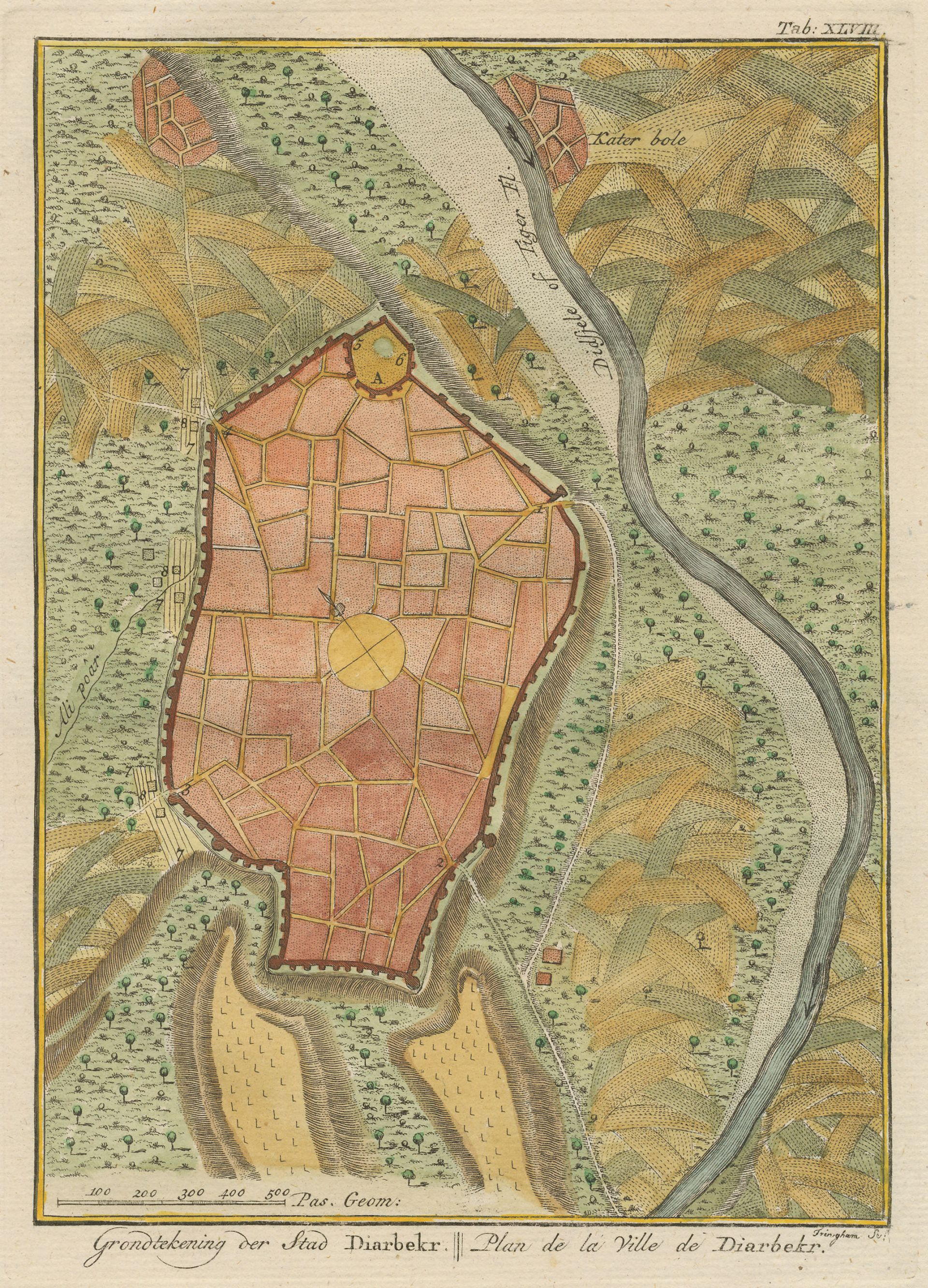 Tahmini 1750 yılına ait bir Diyarbakır çizimi.